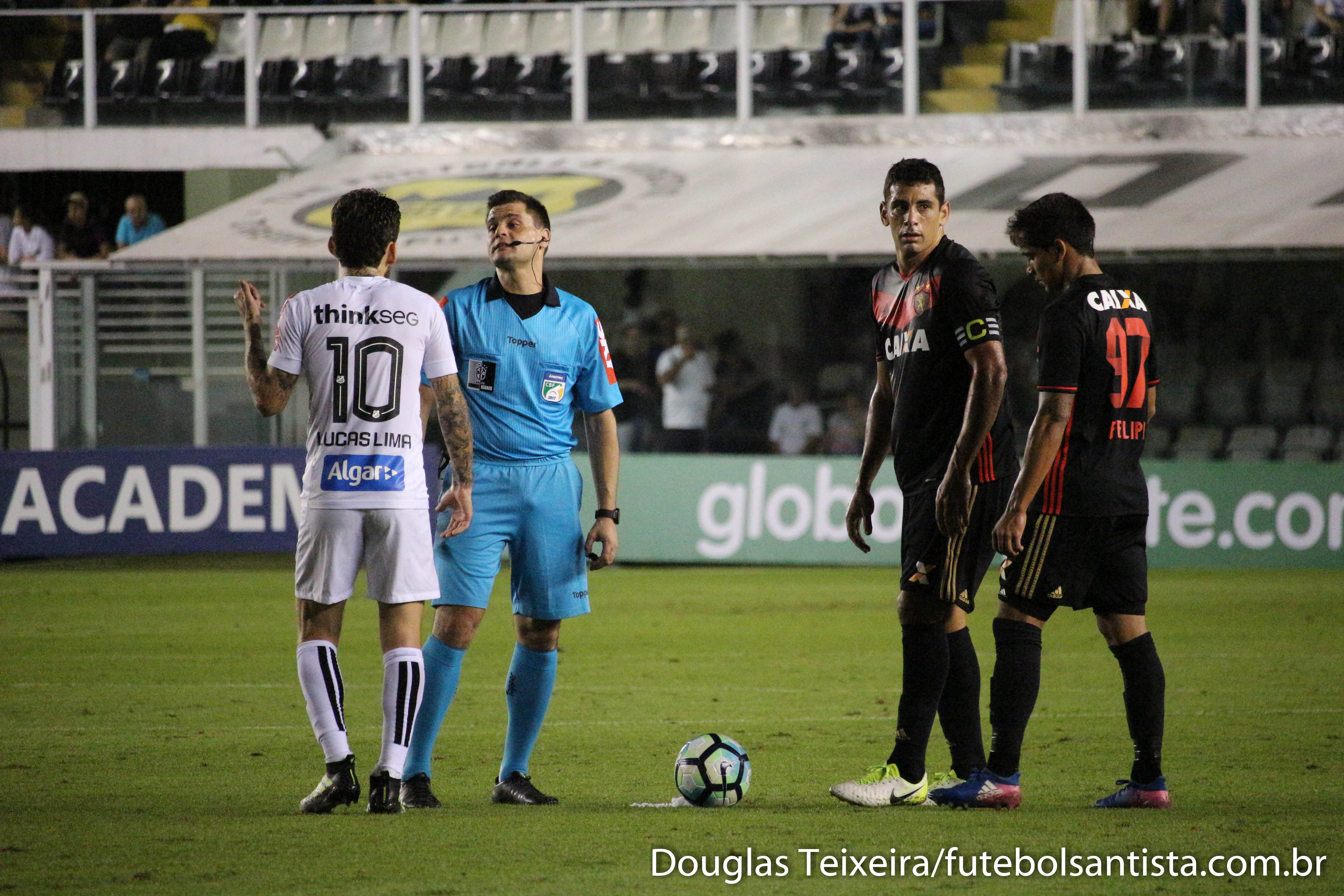 Foto: Douglas Teixeira/Futebol Santista